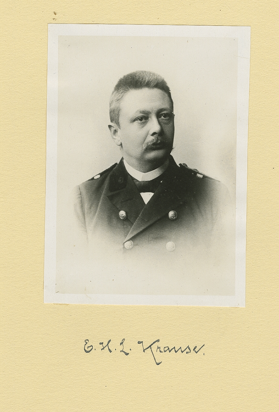 Porträtfotografie von Ernst Krause als Marinestabsarzt der Kaiserlichen Marine in Kiel